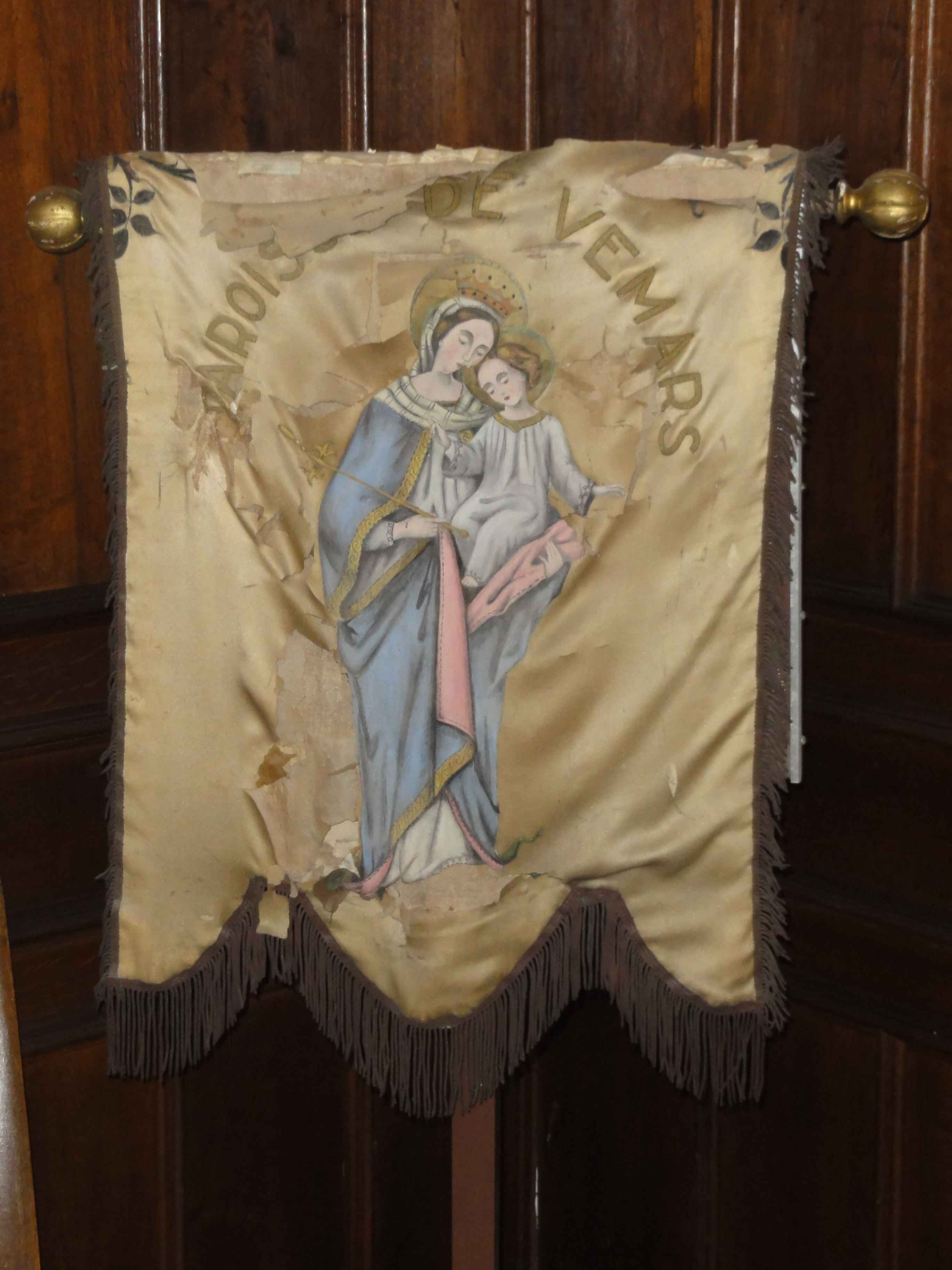 Bannière de procession - Vierge à l'Enfant, début XXe siècle.